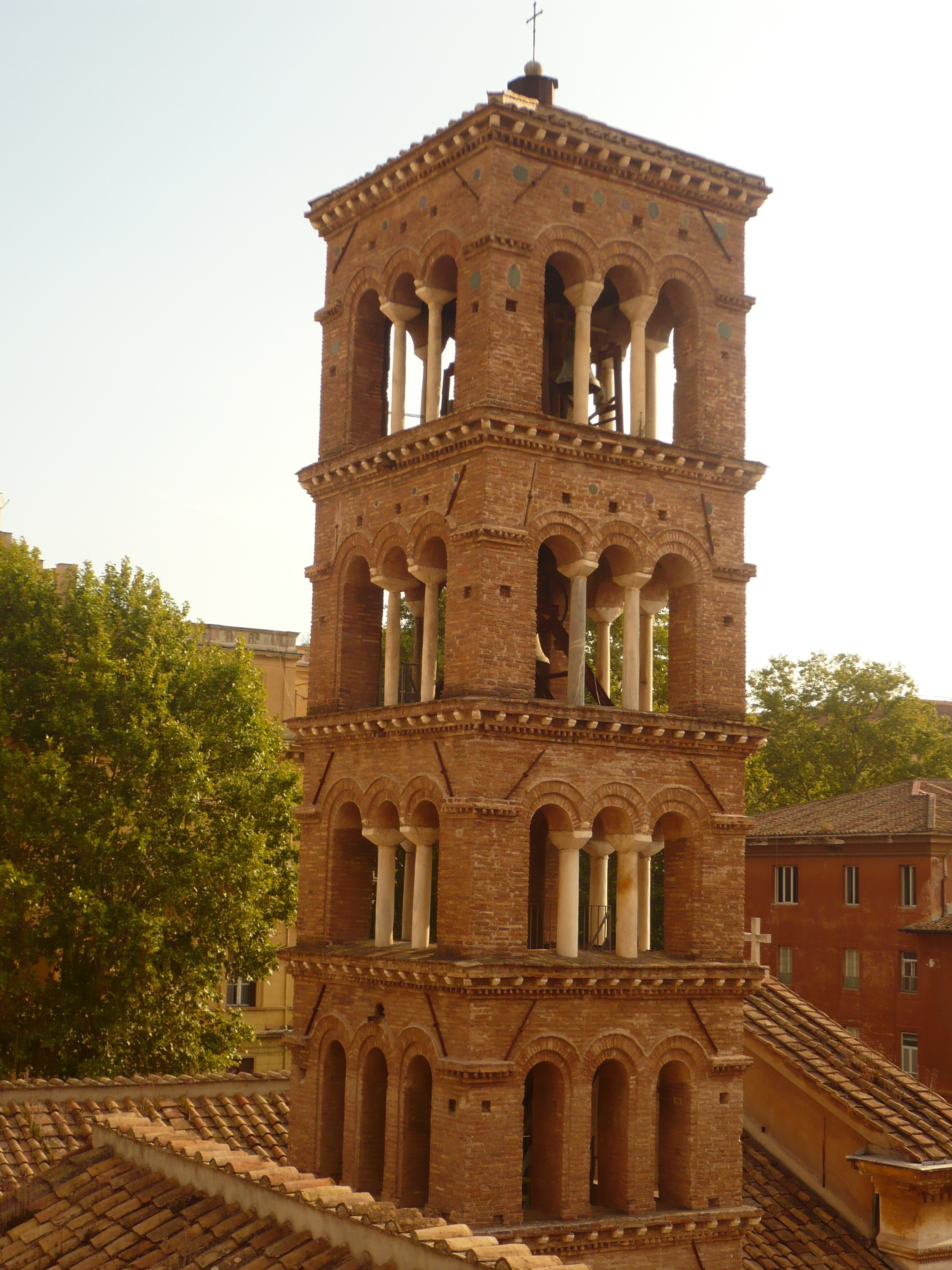 Campanileder Kirche Santa Pudenziana in Rom aus dem frühen 13. Jahrhundert